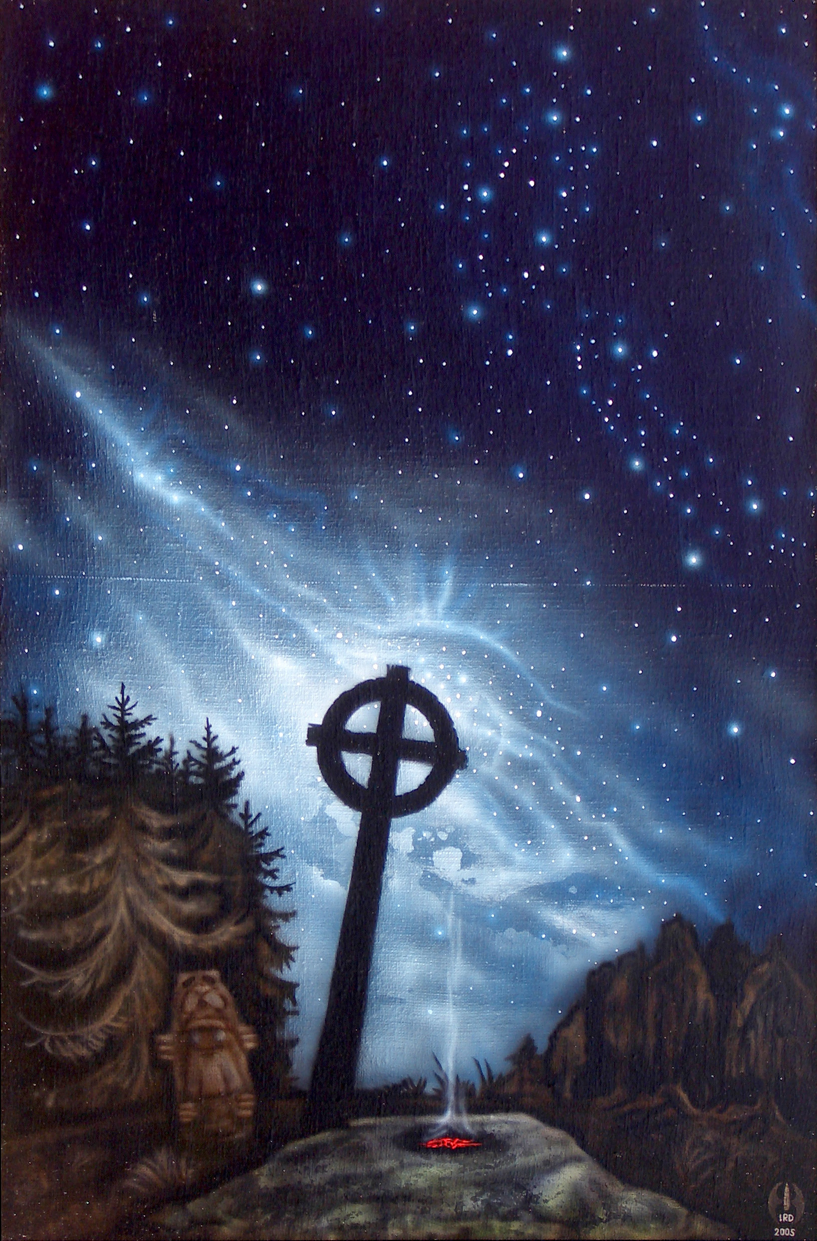 "HIIS" Raivo Ird, 2005, akrüül lõuendil, 65 x 100 cm Pildil on kujutatud Kassinurme pühapaika.